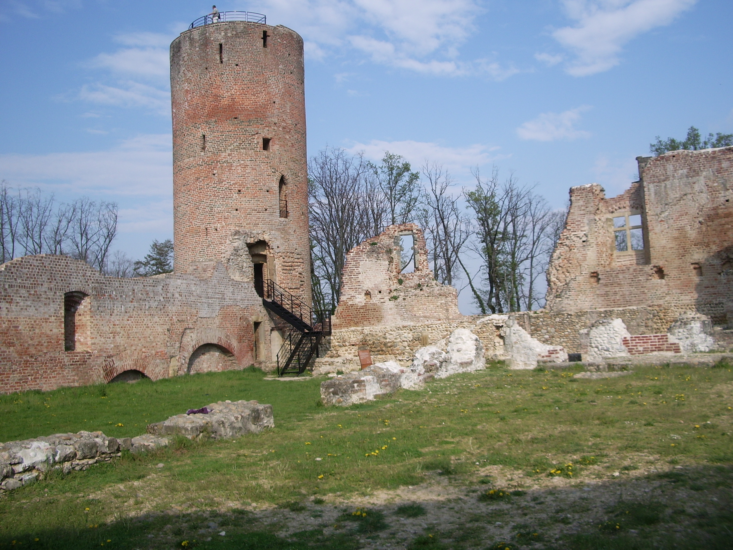 Château de Bressieux (Isère)